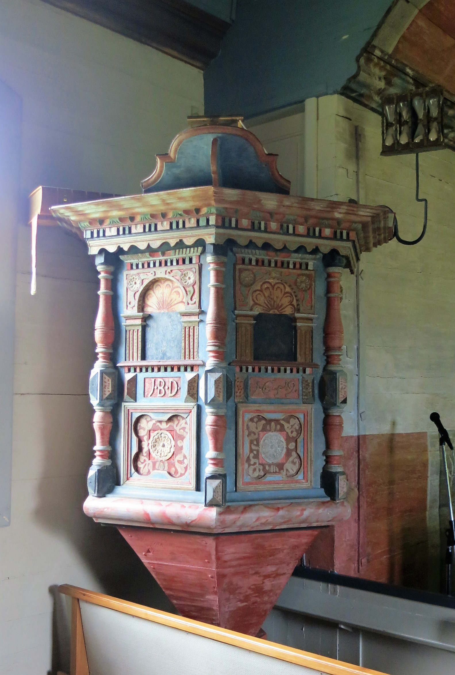 Norra Hestra kyrka, Växjö stift, Småland